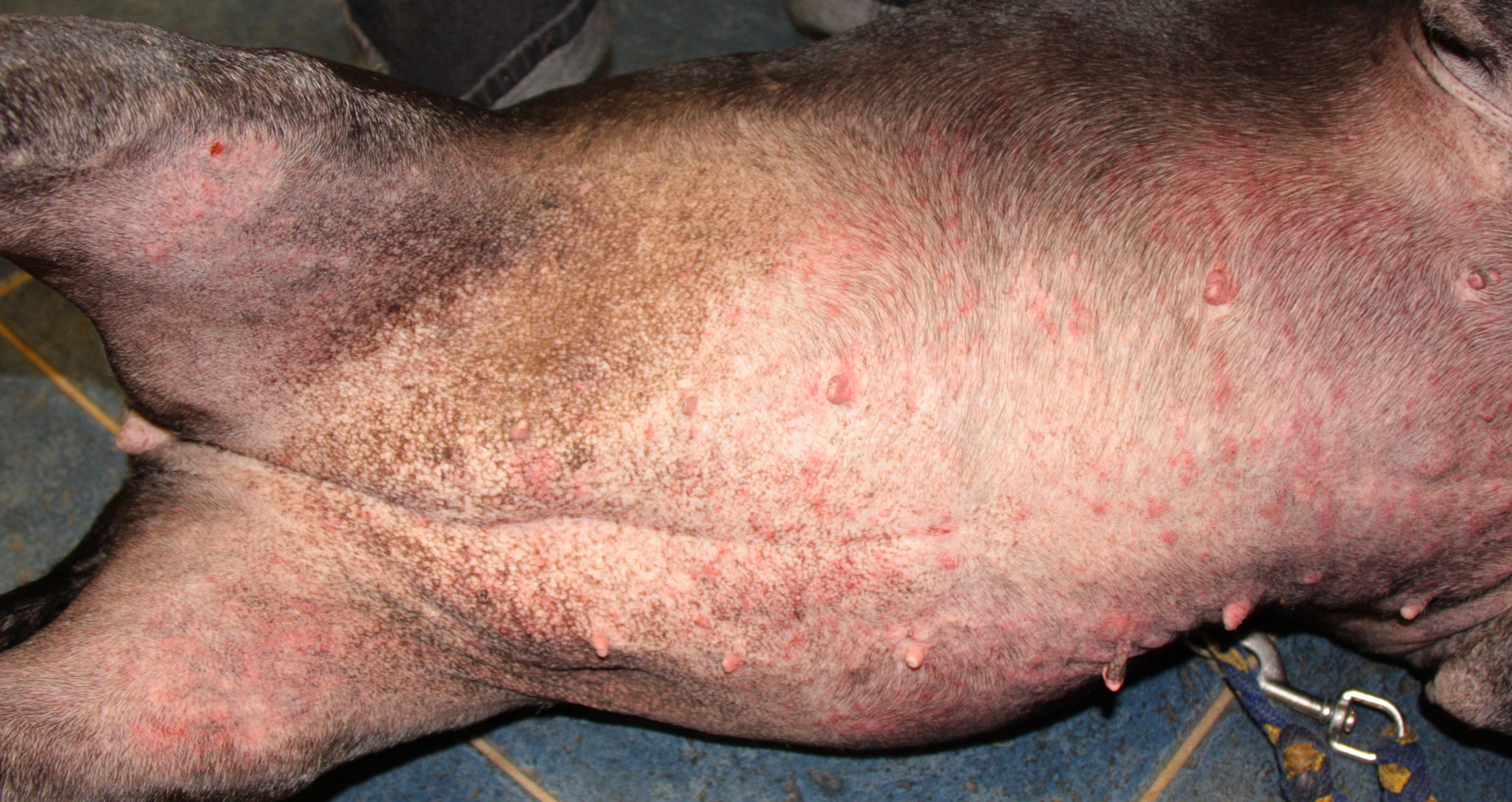 akute allergische Dermatitis, gepaart mit chronischen Hautveränderungen, bei einem Hund.